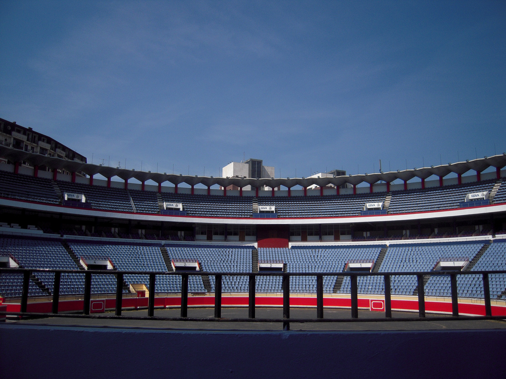 Photo : Nastassia Solovjovas